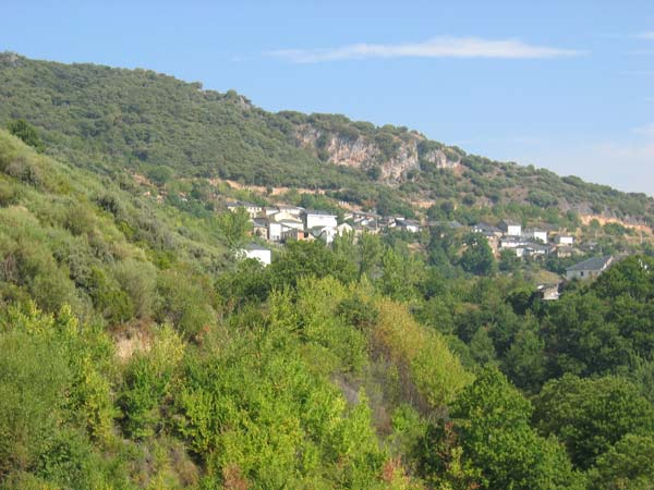 Sobredo. Fotografía tomada en el verano de 2005